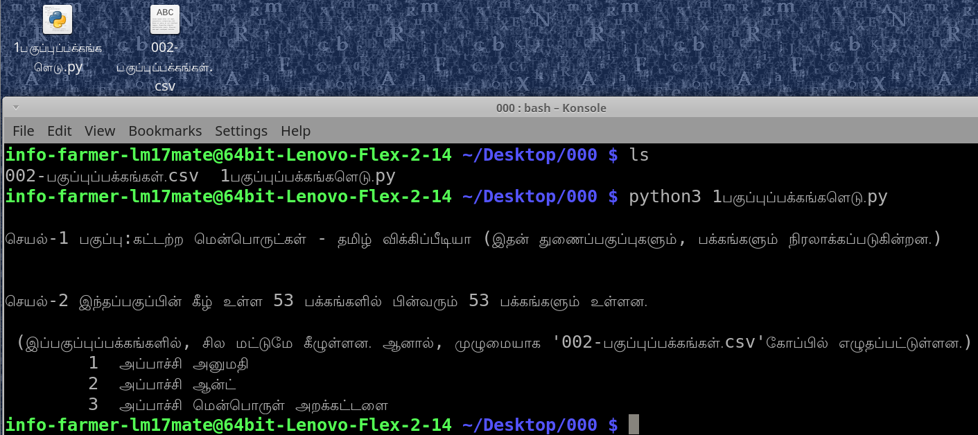 பைத்தான்3, பியூட்டிபுல் சூப் ஆகிய நிரல் மொழிகளில் எழுதியதை இயக்கும் போது, படத்தில் உள்ளவைத் தெரியும். இதில் கன்சோல் என்ற முனையம் பயன்படுத்தப்படுகிறது.